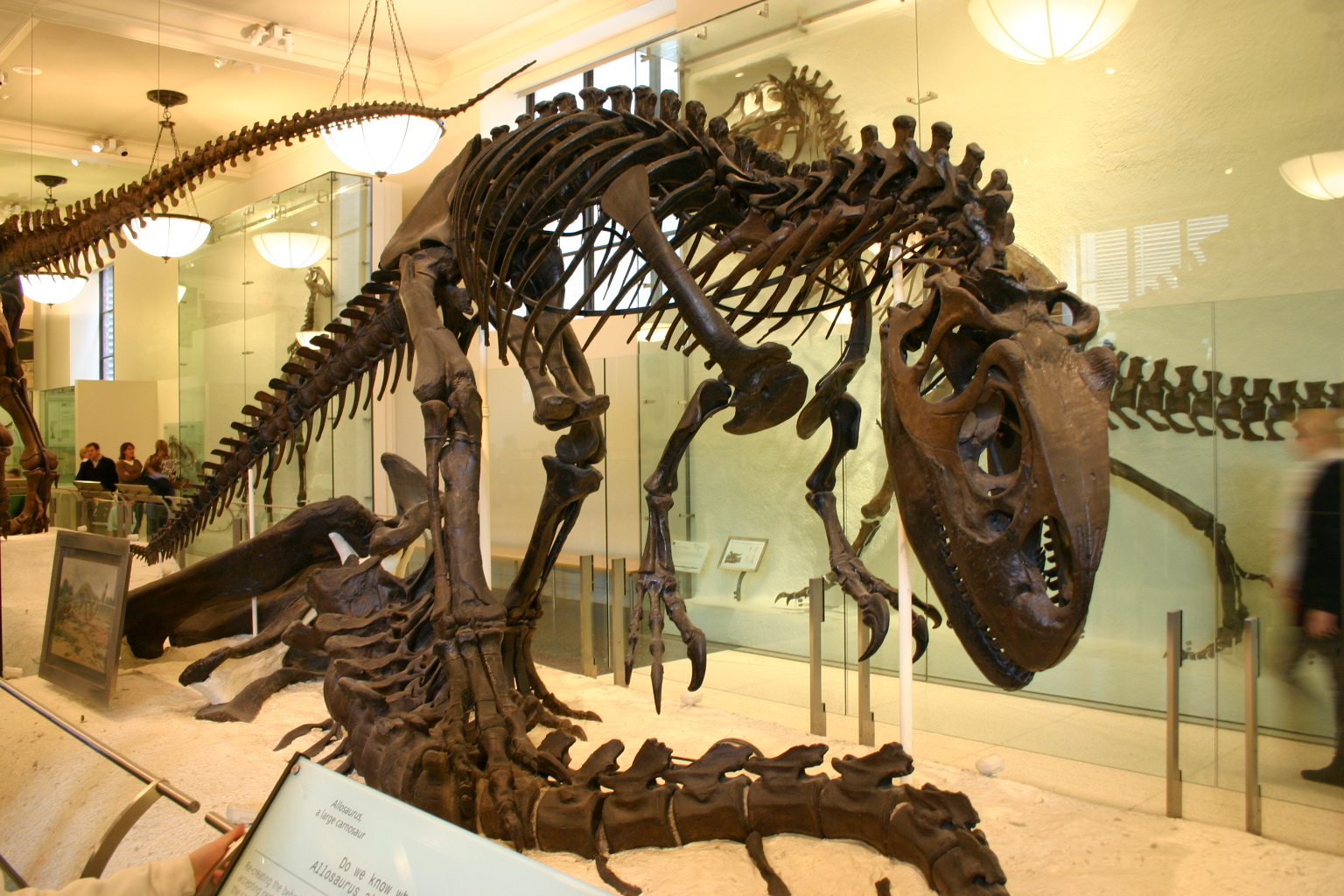 strange reptile over deceptive reptile Visit my blog at